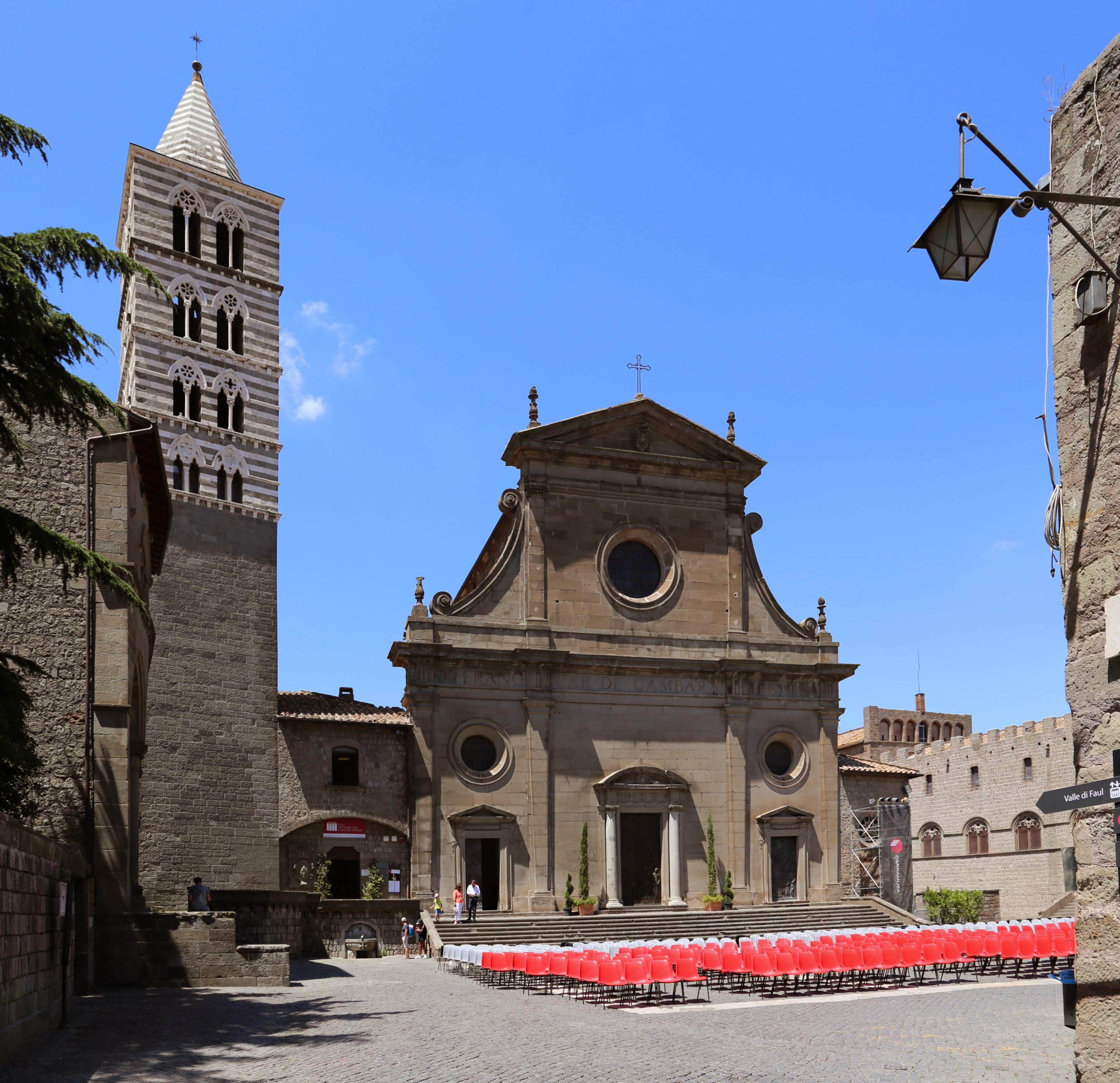 Duomo (Viterbo) This is a photo of a monument which is part of cultural heritage of Italy.